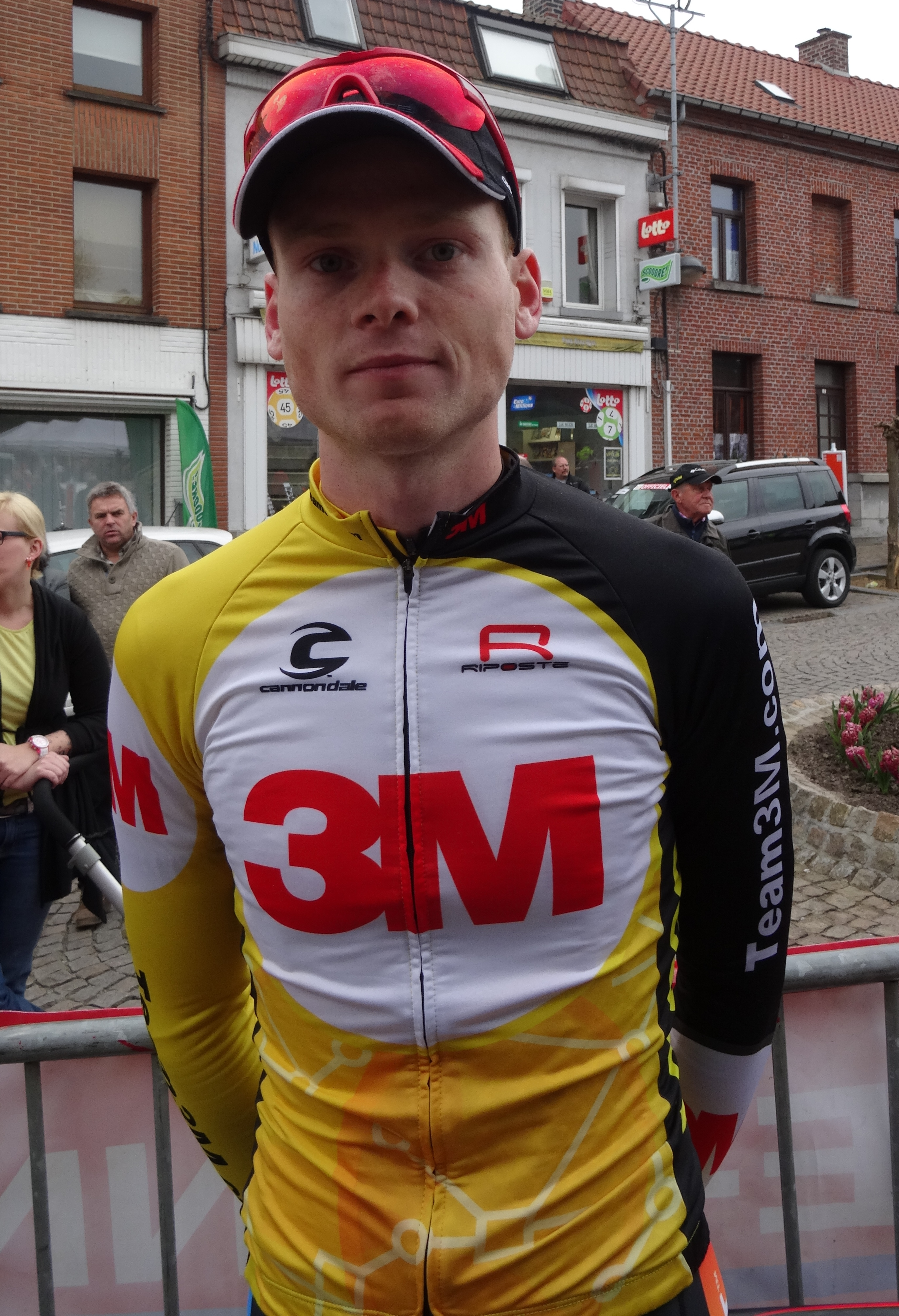 Triptyque des Monts et Châteaux 2014, étape 1, 4 avril 2014, départ d'Antoing. Depicted person: Stef Van Zummeren Depicted team: 3M The creation of these files was made possible thanks to the organizers of the Triptyque des Monts et Châteaux 2014 English | français | +/−